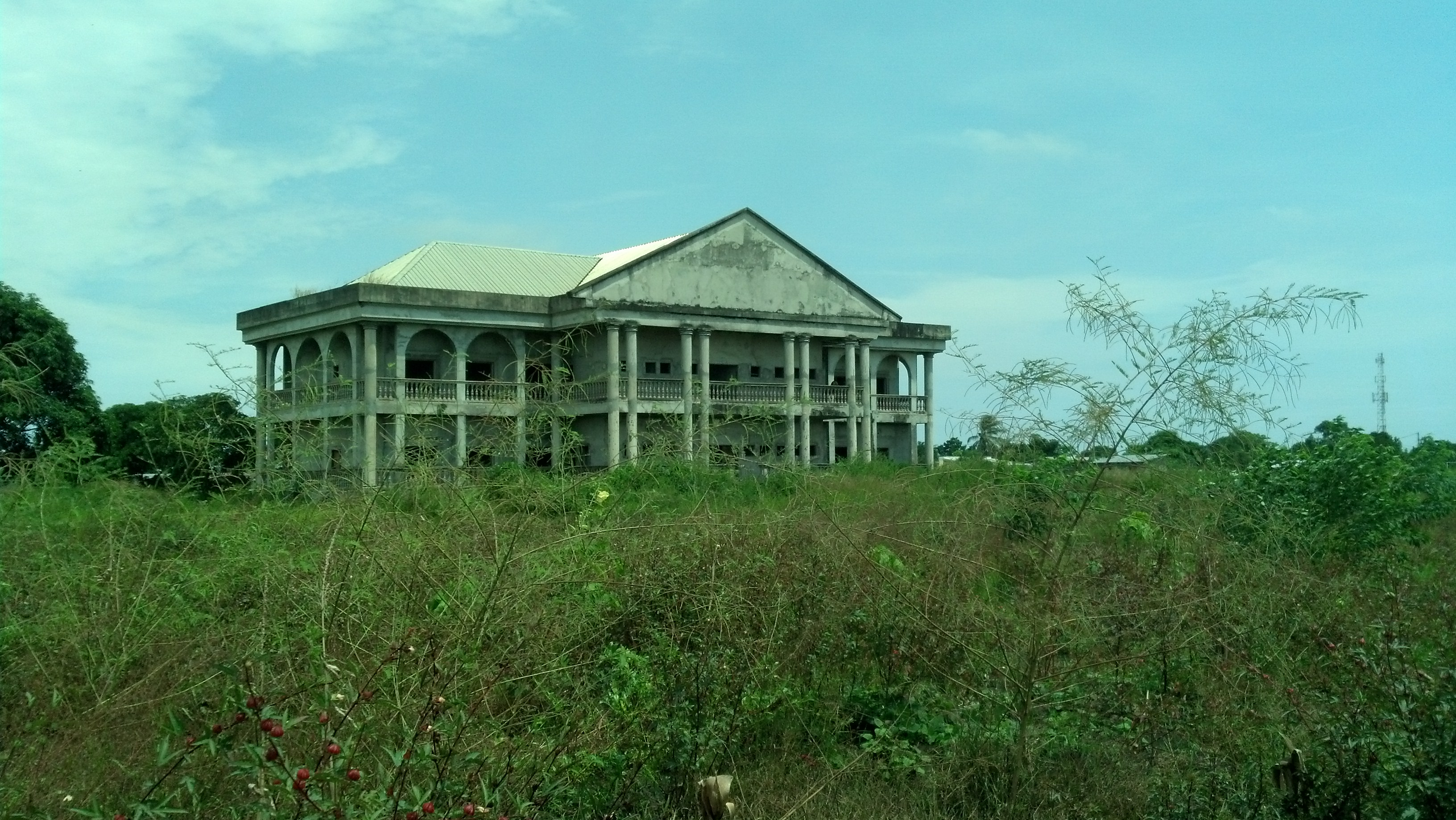 Vue vers la droite